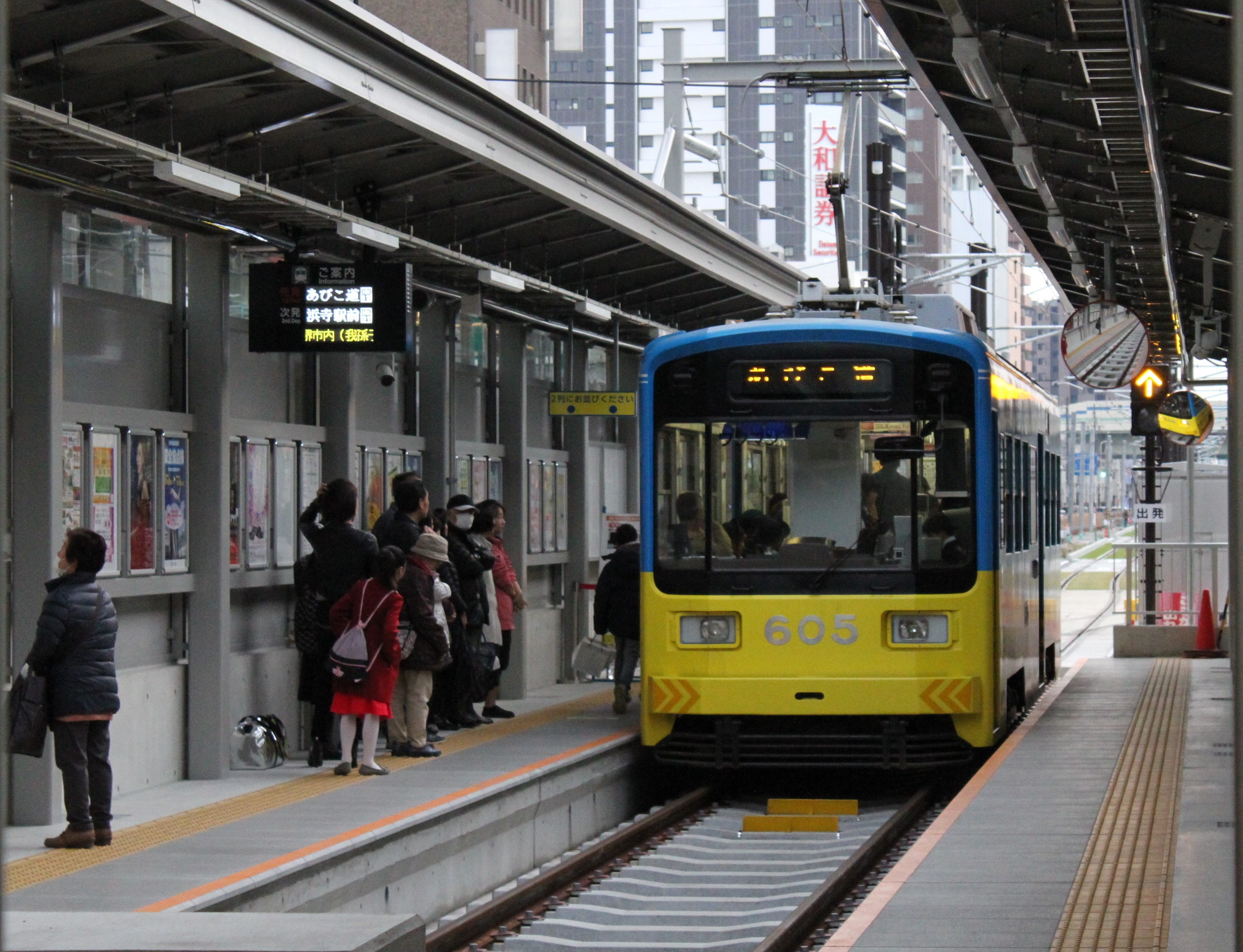 阪堺電気軌道 天王寺駅前駅 新駅舎